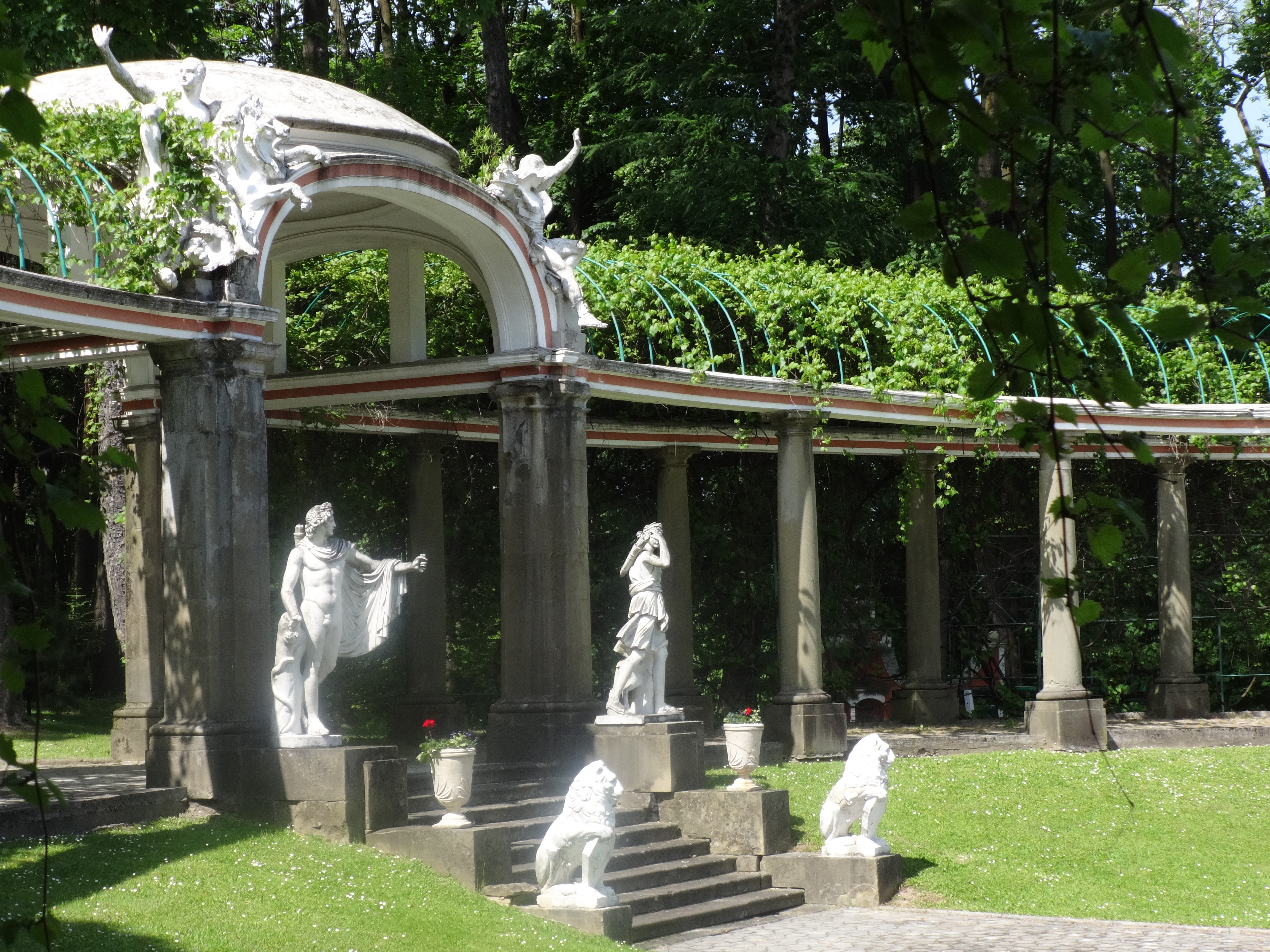 Gorlice Siary, ul. Węgierska 135-141 - pergola w zespole pałacowo-parkowym, 1908